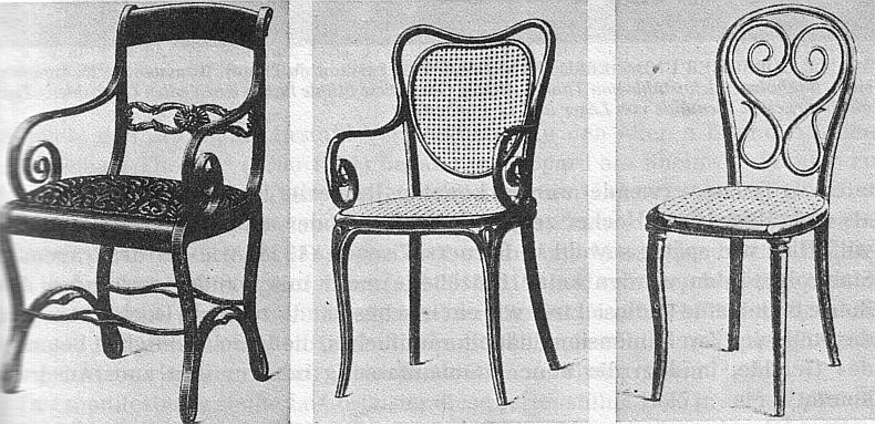 Michael Thonet: Bugholzstühle. a) Armlehnstuhl (1836-1840), b) Armlehnstuhl, Londoner Ausstellung 1851, c) Bugholzstuhl (Kaffeehausstuhl), Wiener Ausstellung 1851 Bis 1891 wurden von dem klassischen Kaffeehausstuhl (Abb. rechts) 7 Millionen Exemplare hergestellt.